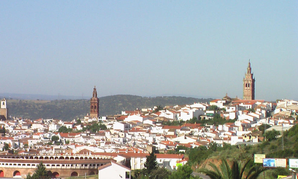 Blick auf Jerez de los Caballeros